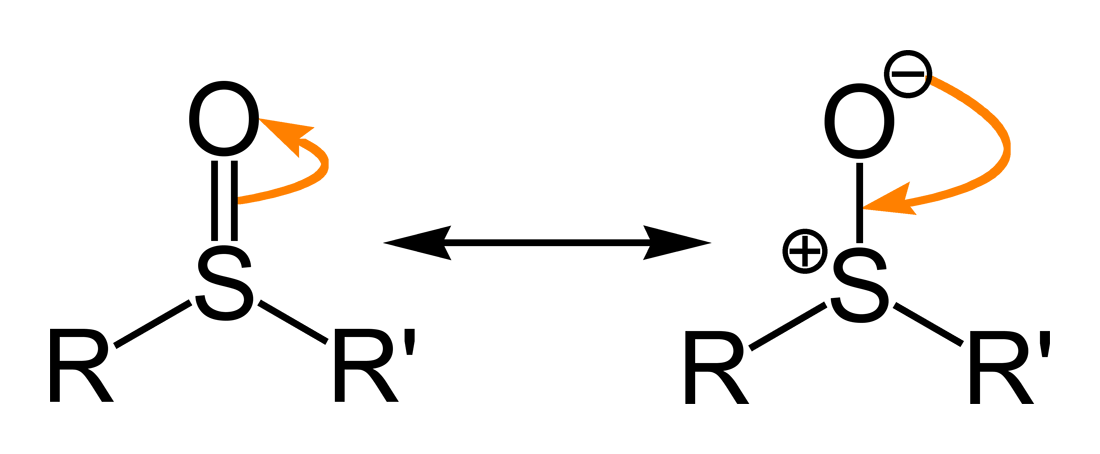 Sulfoxide-resonance